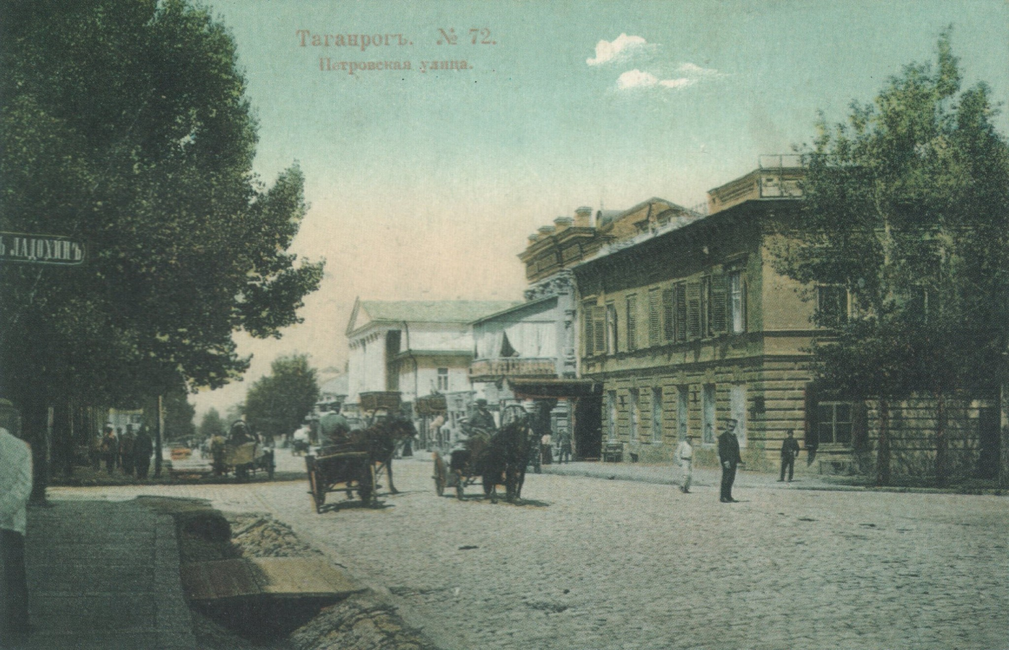 Петровская улица, Таганрог Ростовская область РФ